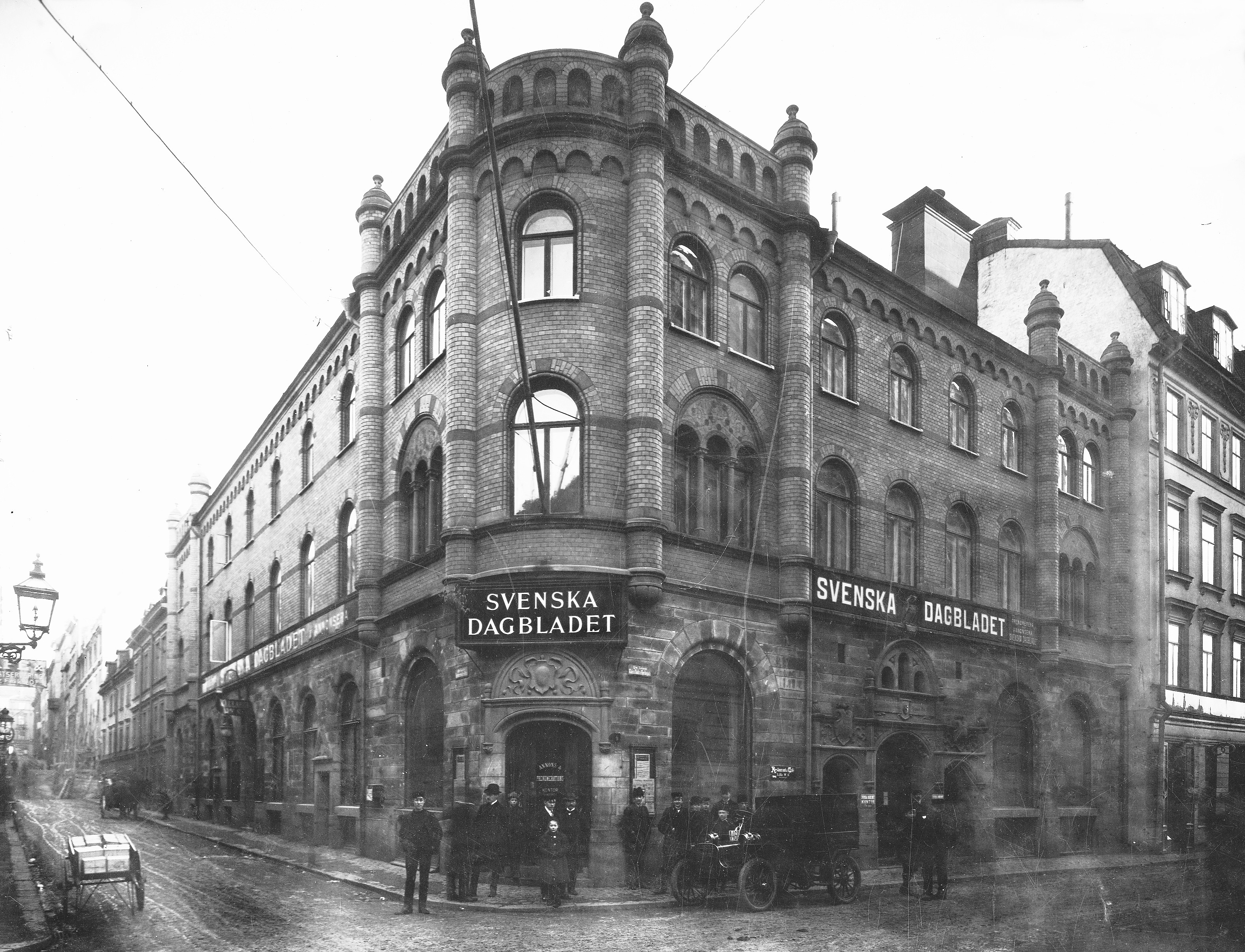 Svenska Dagbladets redaktionshus vid Karduansmakargatan 13 / Klara Södra Kyrkogata i kvarteret Loen. Arkitekter Ullrich & Hallquist. Byggnadsår 1897